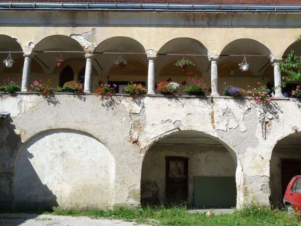 Dvorec Prešnik nad Lopato